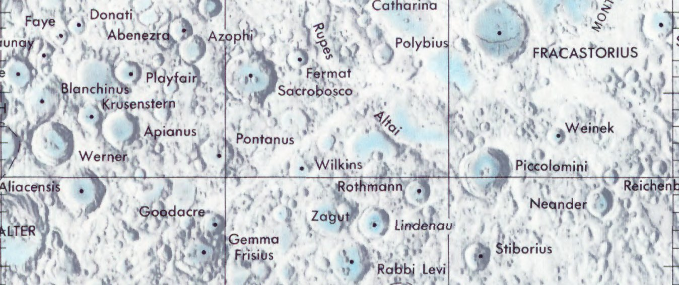 Cráter lunar Wilkins. Localización. (Lunar Chart LPC1. Second Edition)